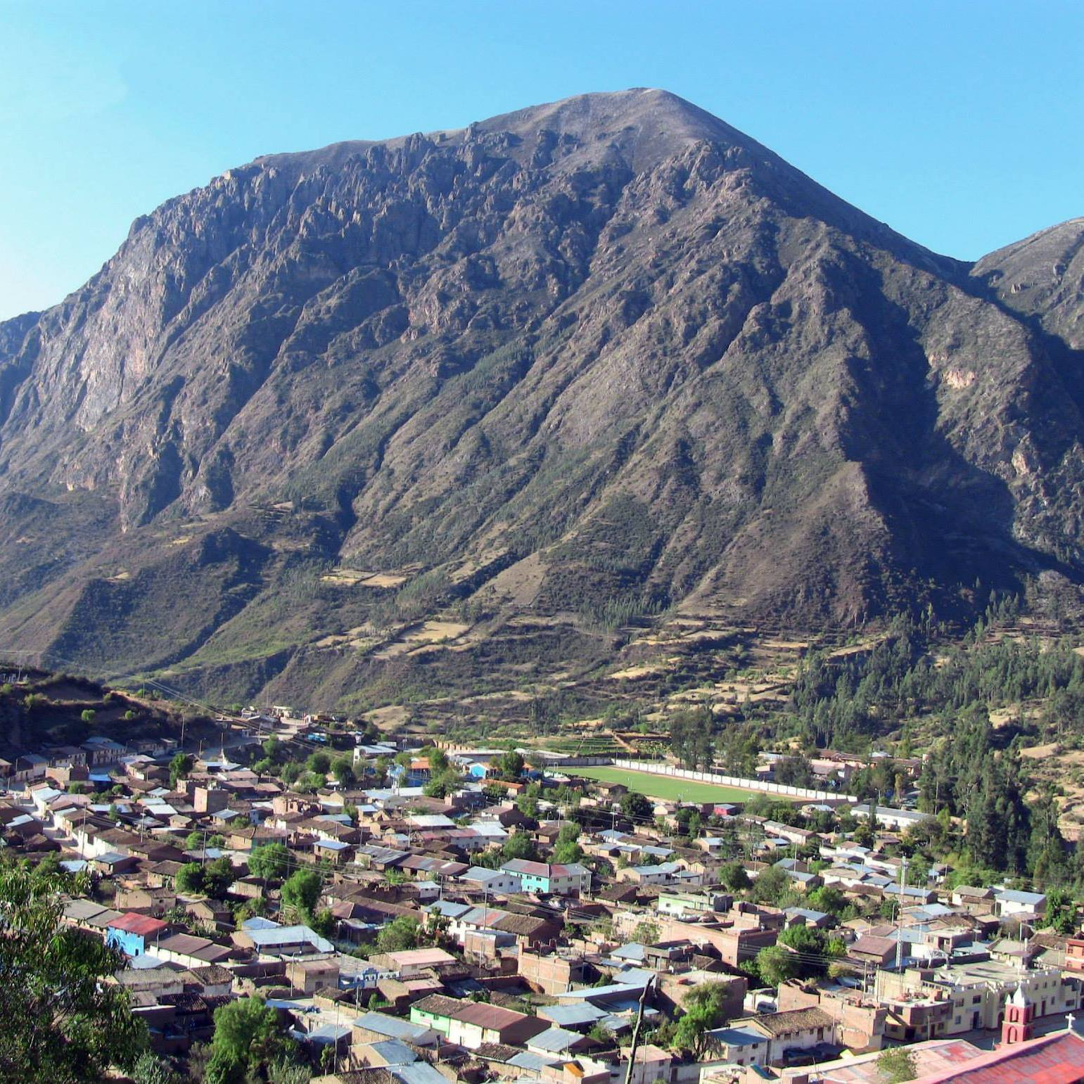 Vista panorámica de la Cuidad de Huancapi, Capital de la Provincia de Fajardo - Ayacucho. Huancapi, localizada a 124 km. de Huamanga capital departamental.